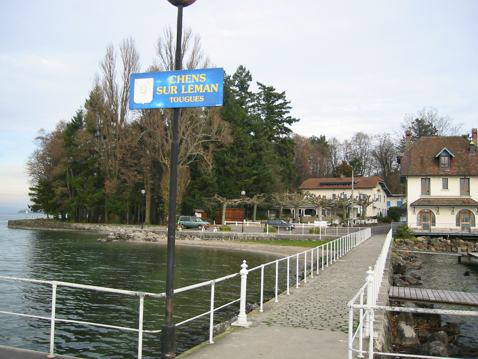 Le Port de Tougues, (Classement, 1997) .